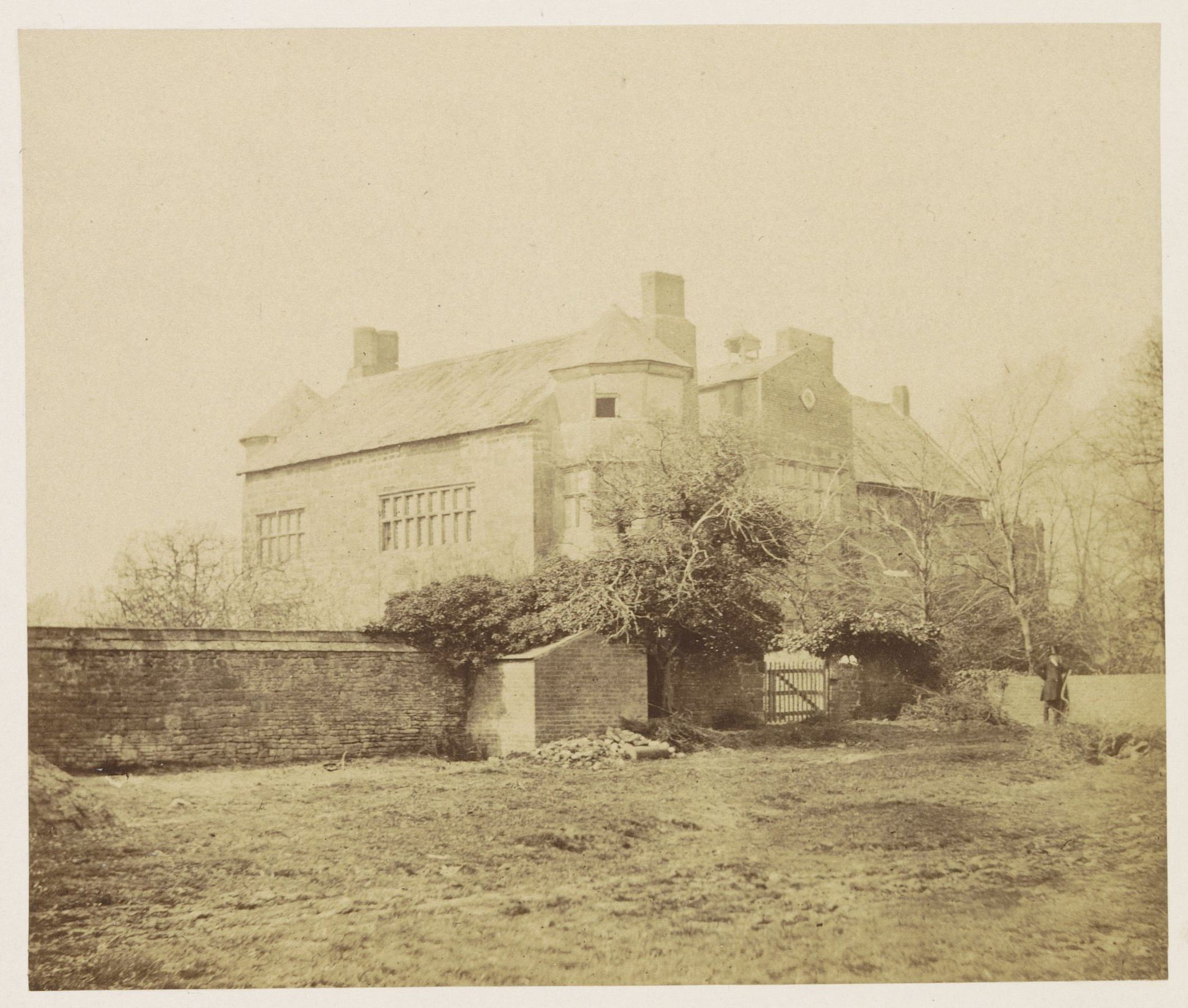 IdentificatieTitel(s): Gezicht op Poole Hall in PoolePoole HallObjecttype: foto bladzijde Objectnummer: RP-F-2001-7-1471-6VervaardigingVervaardiger: fotograaf: William Bryans (vermeld op object)Plaats vervaardiging: PooleDatering: ca. 1850 - in of voor 1858Materiaal: fotopapier Techniek: albuminedrukAfmetingen: foto: h 139 mm × b 165 mmToelichtingFoto tegenover pagina 17.OnderwerpWat: rural housing, e.g. country-house, villa, cottageWaar: Poole HallVerwerving en rechtenCredit line: Aankoop met steun van de Mondriaan Stichting, het Prins Bernhard Cultuurfonds, het VSBfonds, het Paul Huf Fonds/Rijksmuseum Fonds en het Egbert KunstfondsVerwerving: aankoop 2001Copyright: Publiek domein